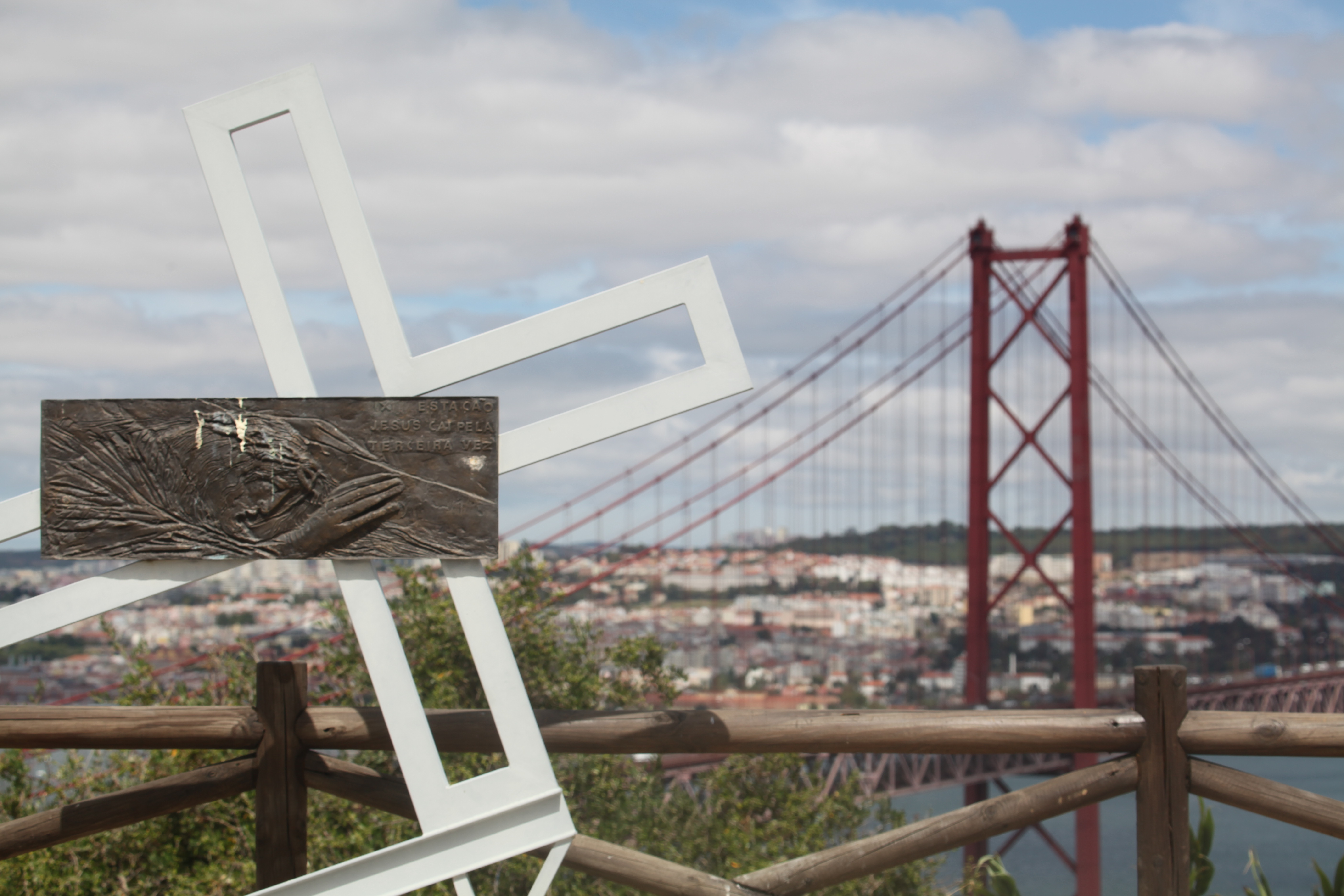 Lisbonne